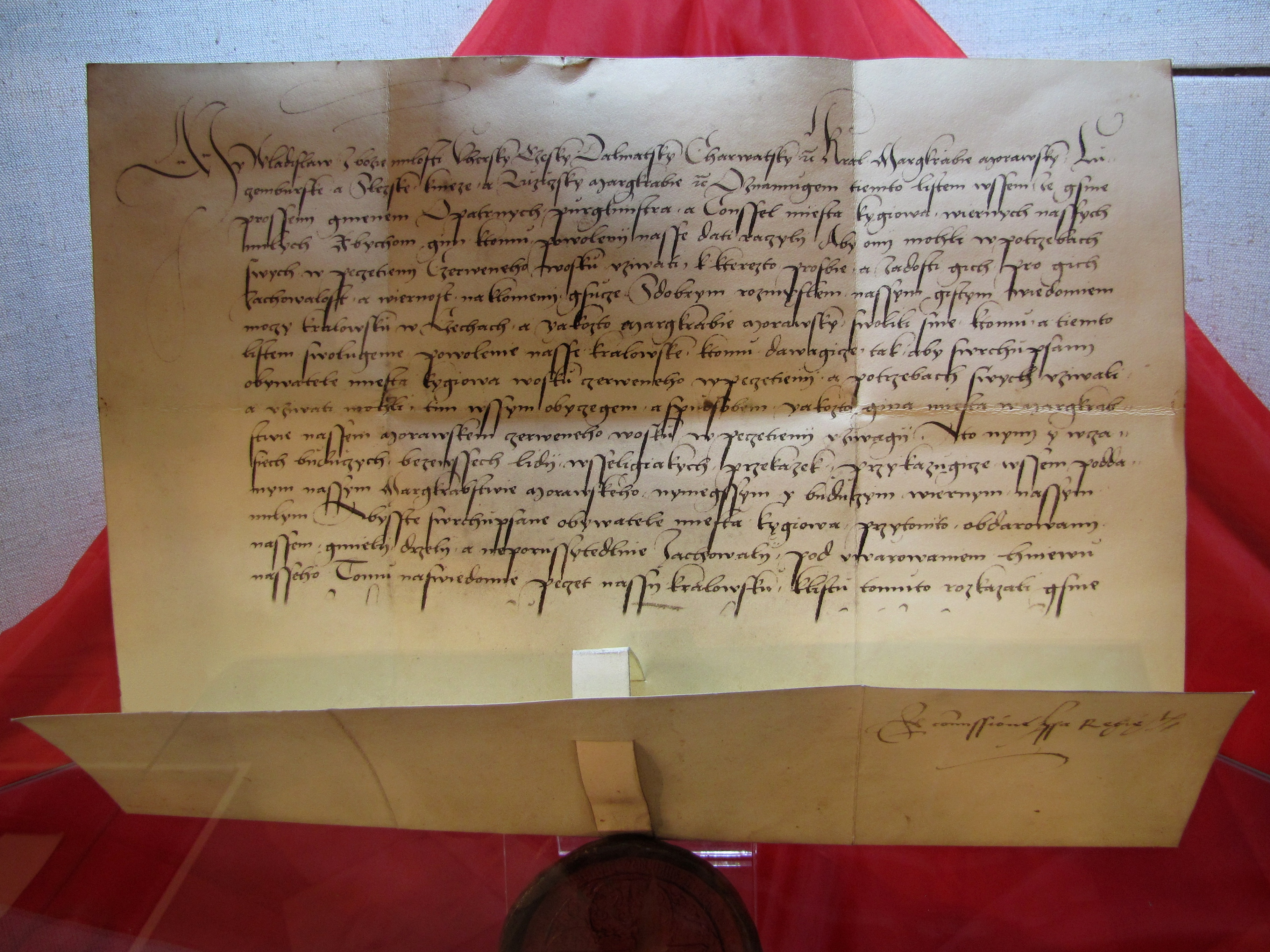 Faksimile listiny krále Vladislava Jagelonského, kterou v roce 1515 udělil městu Kyjov povolení pečetit červeným voskem. Text: My Vladislav, z boží milosti uherský, český, dalmatský, chorvatský král, markrabě moravské, lucemburské a slezské kníže a lužický markrabě oznamujem tímto listem všem, že jsme prošeni jménem opatrných purkmistra a konšel města Kyjova, věrných našich milých, abychom jim k tomu povolení naše dáti ráčili, aby oni mohli v potřebách svých v pečetění červeného vosku užívati, k kteréžto prosbě a žádosti jich pro jich zachovalost a věrnost nakloněný jsúce s dobrým rozmyslem naším jistým vědomím moci královské v Čechách, a jakožto markrabě moravský, svolili jsme k tomu a tímto listem svolujeme, povolení naše královské k tomu dávajíce tak, aby svrchu psaní obyvatelé města Kyjova vosku červeného v pečetění a potřebách svých užívali a užívati mohli, tím vším obyčejem a způsoby jakožto jiná města v markrabství našem moravském červeného vosku v pečetí užívají. A to nyní i v časech budoucích beze všech lidí, všelijakých překážek přikazujíce všem poddaným našim markrabství moravského nynějším i budúcím věrným našim milým, abyste svrchupsané obyvatele města Kyjova při tomto obdarování našem měli drželi a neporušitedlně zachovali, pod varováním hněvu našeho, na svědomí pečeť naši královské k listu tomuto rozkázali jsme přivěsiti. Dán v Prešpurce na Boží tělo léta božího tisícího pětistého patnáctého, království našich uherského pětadvacátého a českého čtyřicátého čtvrtého.